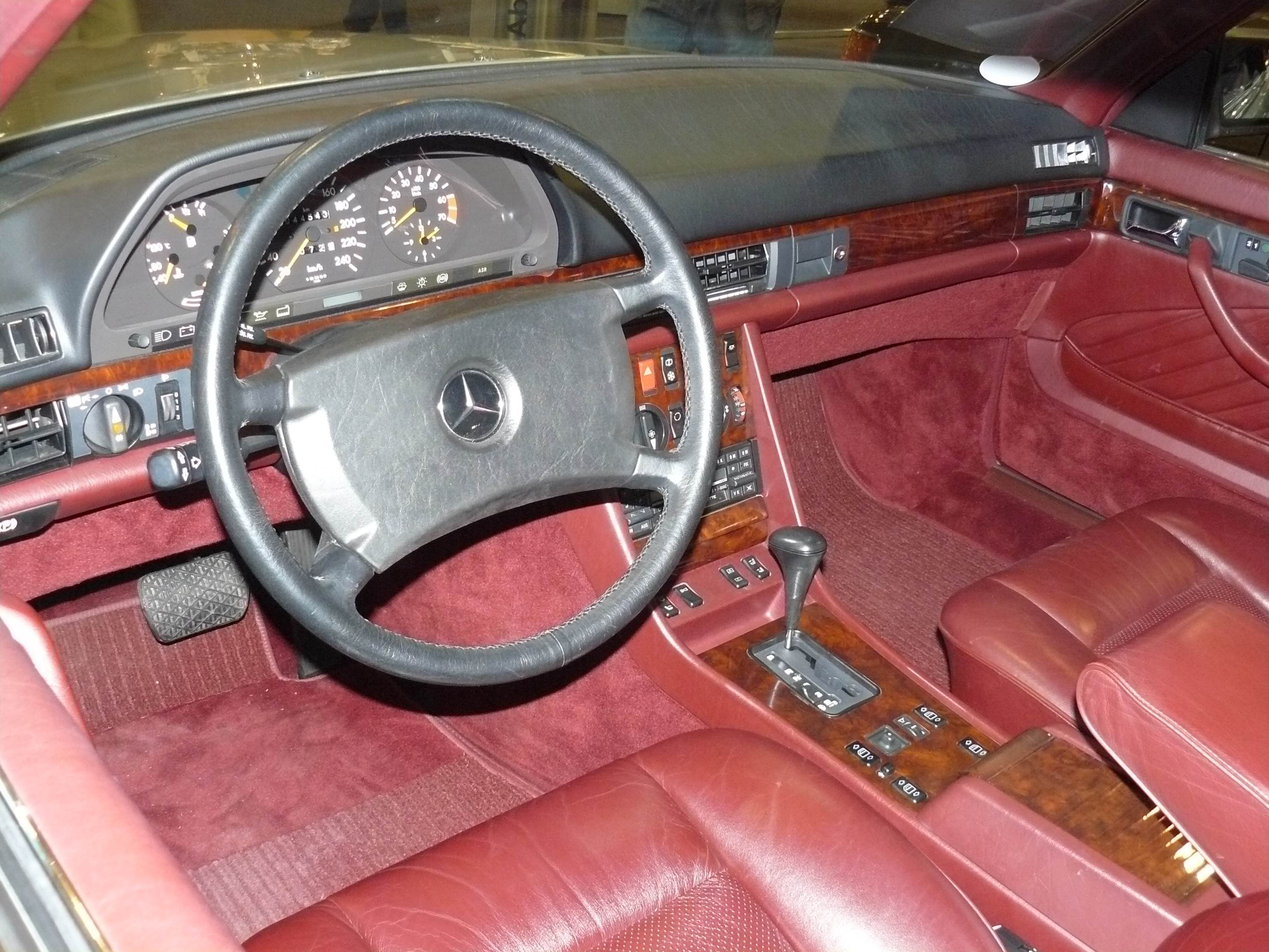 Essen 2011